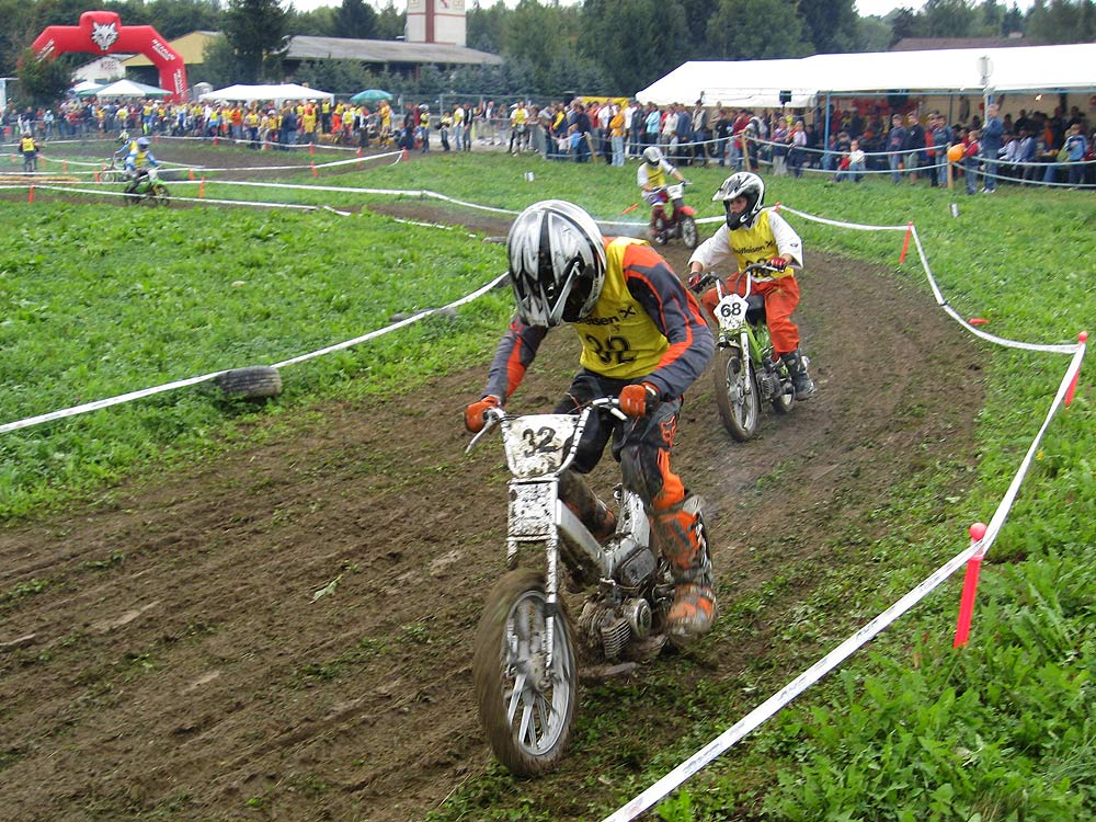 Puch Maxi im Rennsporteinsatz (Zweirad Club "Bist du Moped", Wünschendorf)